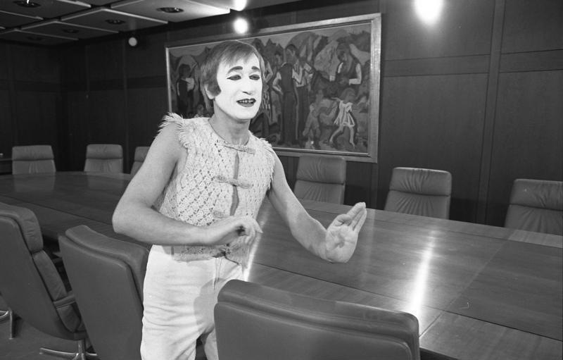 Aufnahmen des WDR-Fernsehens im Bundeskanzleramt mit dem Pantomimen Milan Sladek